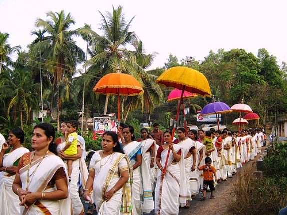 Kanhangad, Kerala, India. Kanhangad, India.